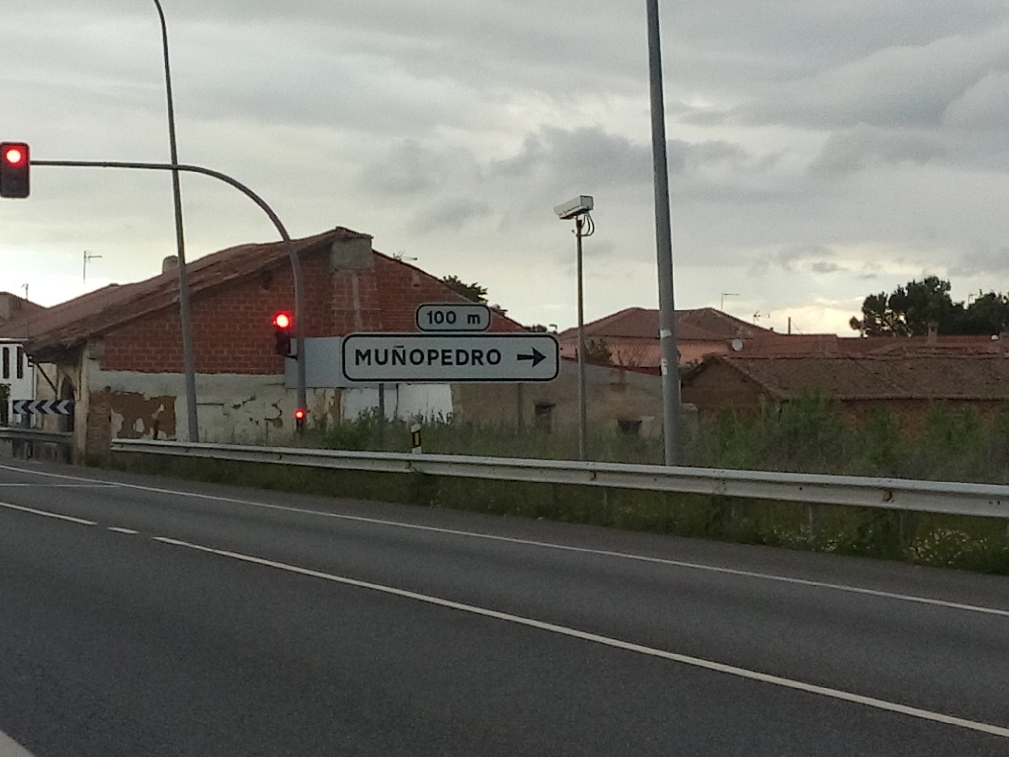 Muñopedro (Segovia)